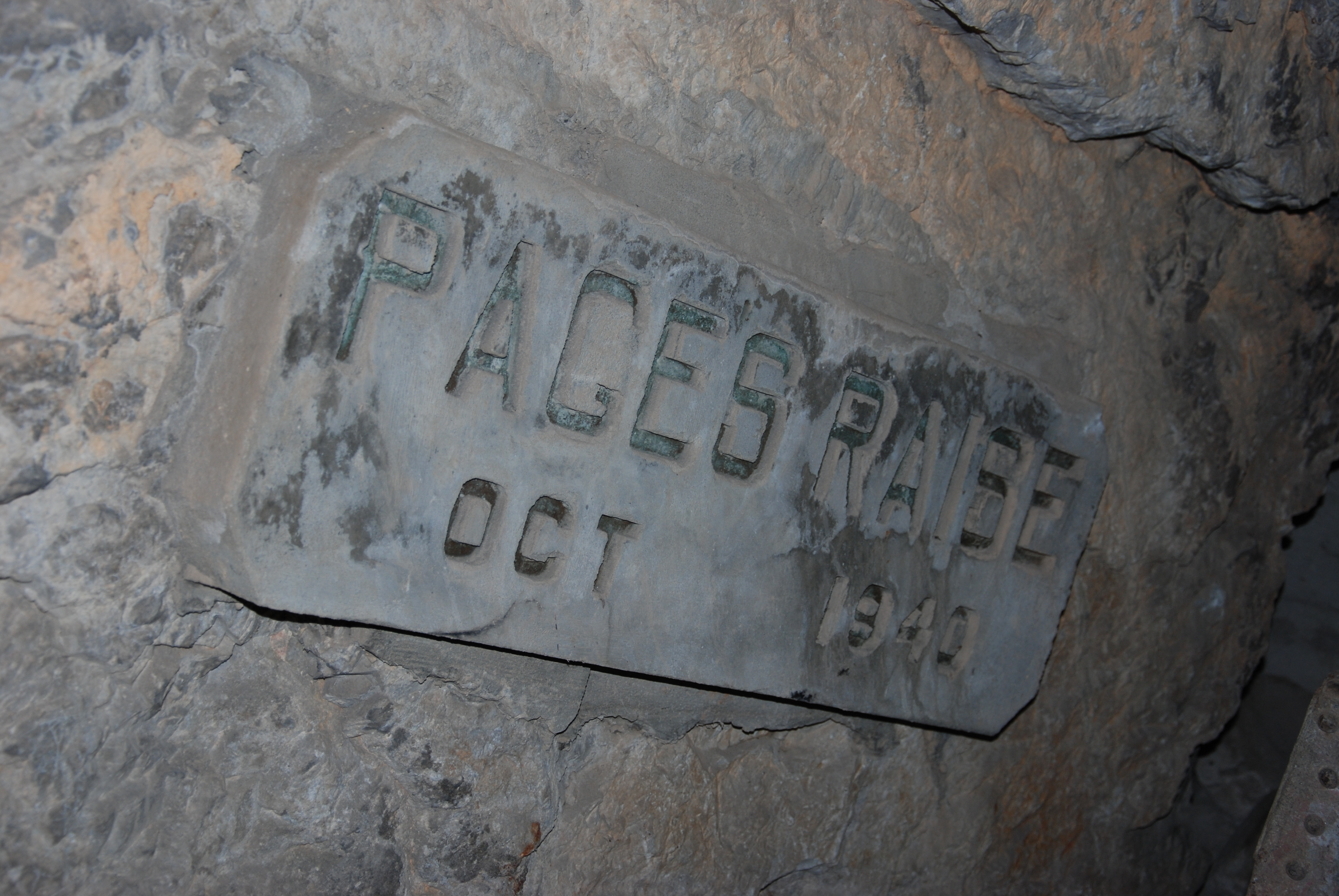 Pages Raise, Gibraltar